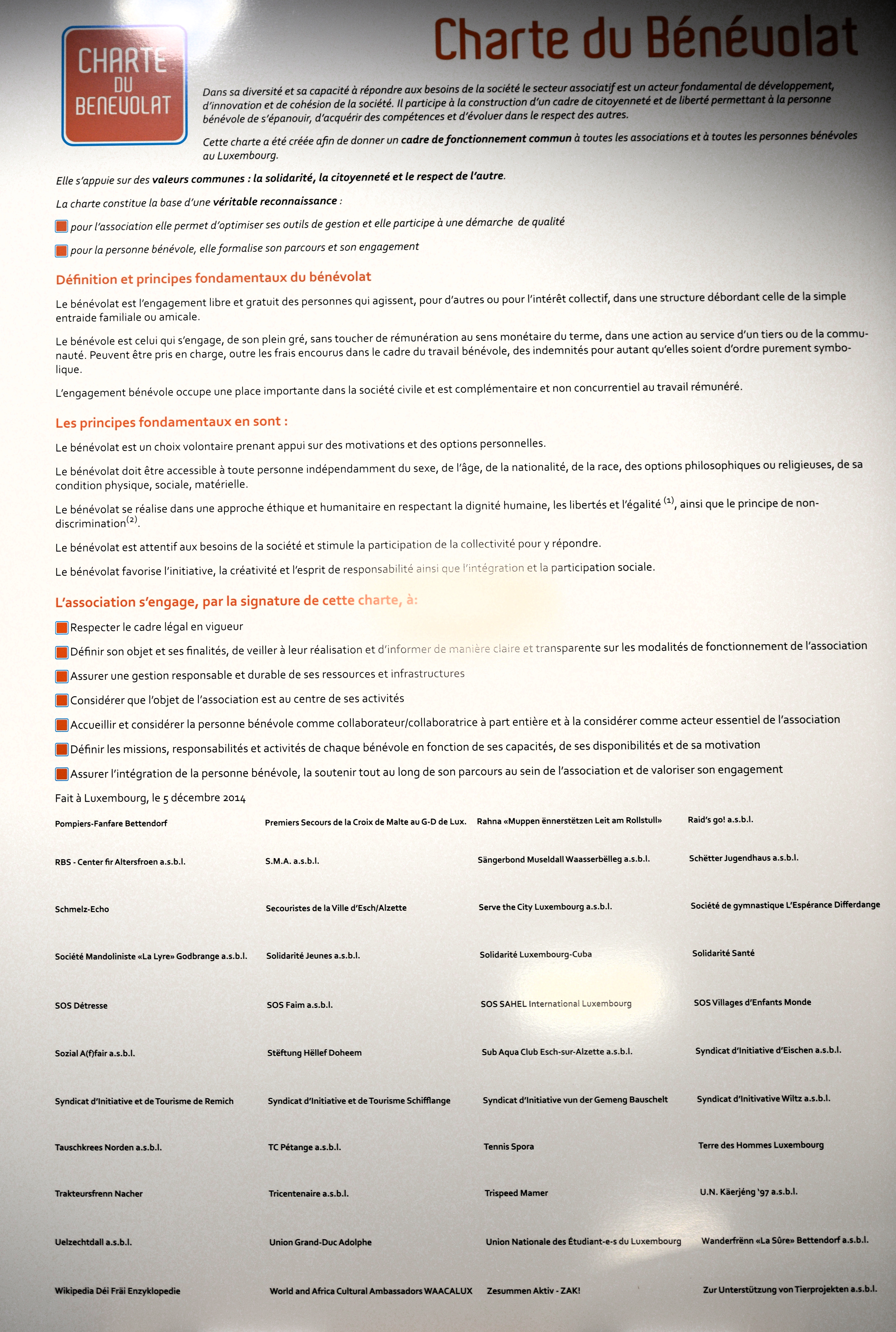 De 5. Dezember 2014 war zu Leideleng, am Gebai «la Philanthropie», déi symbolesch Iwwerreechung vun der Charte du bénévolat un déi éischt 245 Signatairen, dobäi och un d'Wikipedia a Lëtzebuerger Sprooch. D'Evenement gouf duerch d'Präsenz vun der Groussherzogin geéiert.